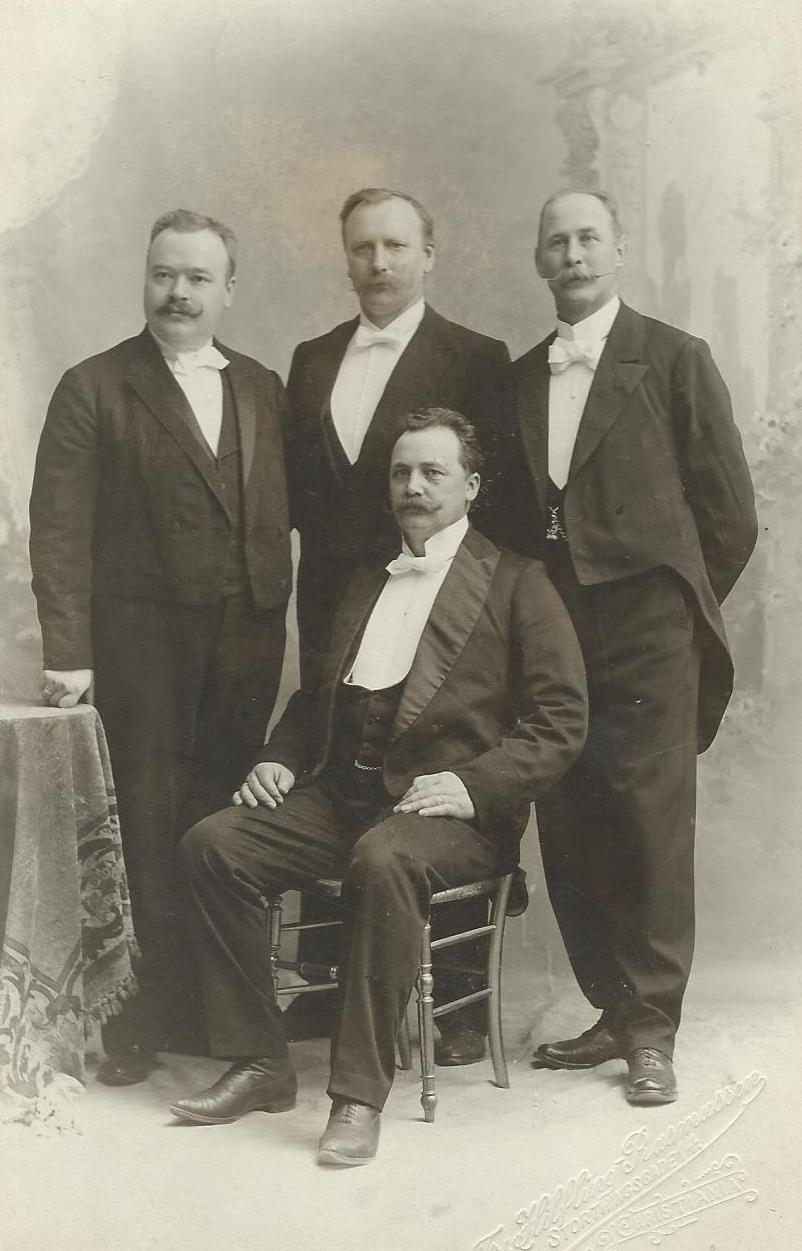 Trondhjems Stortingsmend 1903-1907. Hans Jørginus Hansen sittende